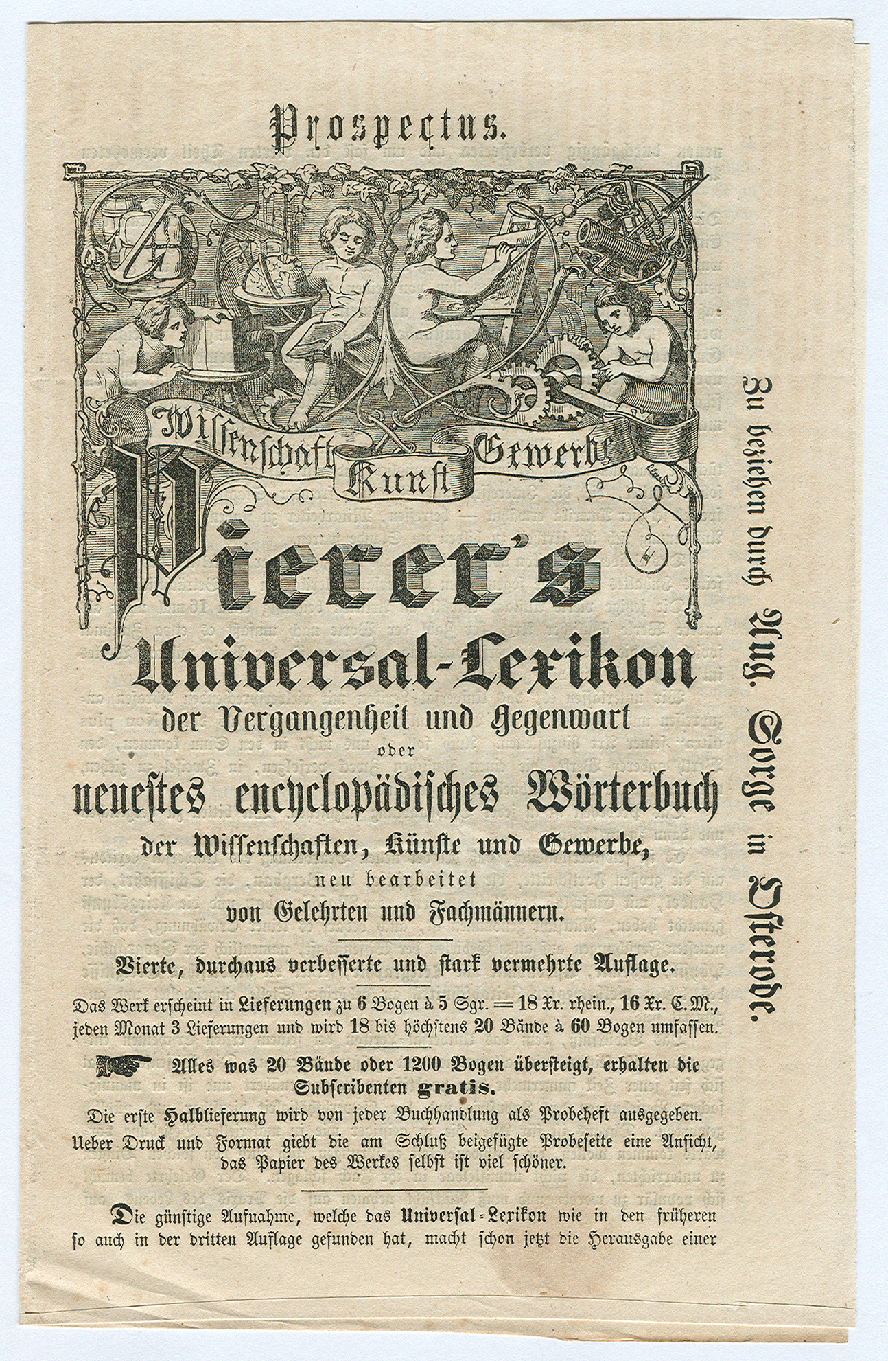 Prospectus. Wissenschaft, Kunst, Gewerbe Pierer' s Universal-Lexikon der Vergangenheit und Gegenwart oder neuestes encyclopädisches Wörterbuch der Wissenschaften, Künste und Gewerbe, neu bearbeitet von Gelehrten und Fachmännern. Vierte, durchaus verbesserte und stark vermehrte Auflage. Format ca. 15,5 x 24,2 cm